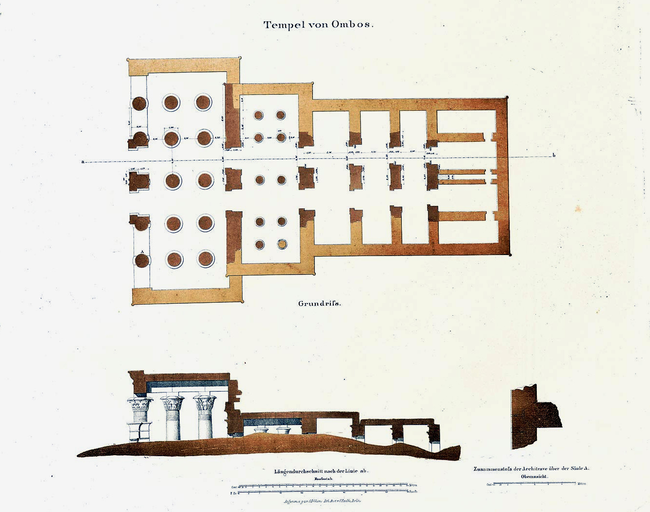 Denkmaeler aus Aegypten und Aethiopien nach den Zeichnungen der von Seiner Majestät dem Koenige von Preussen, Friedrich Wilhelm IV., nach diesen Ländern gesendeten, und in den Jahren 1842–1845 ausgeführten wissenschaftlichen Expedition auf Befehl Seiner Majestät